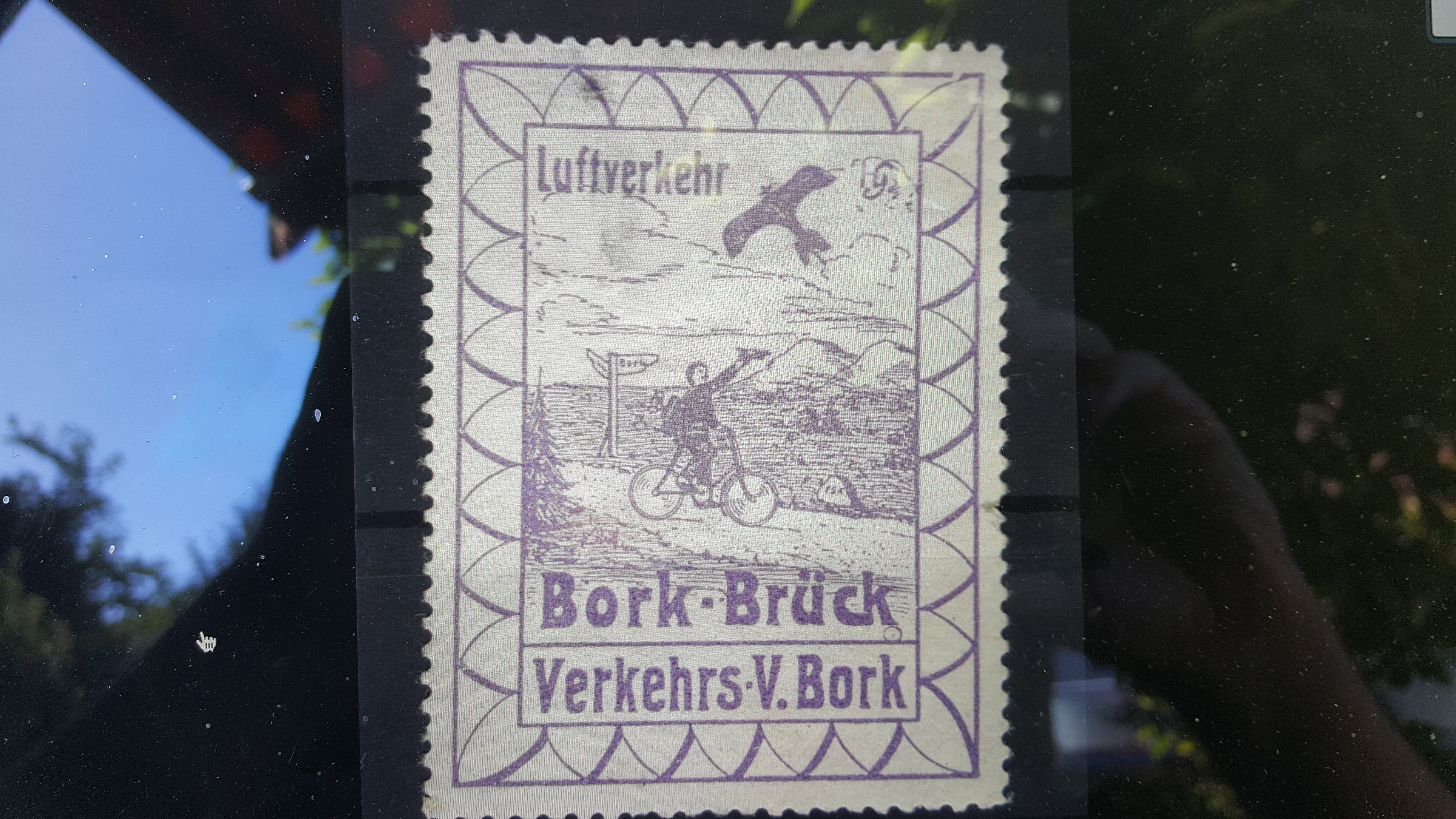 Velokurier Post mit Flugzeug